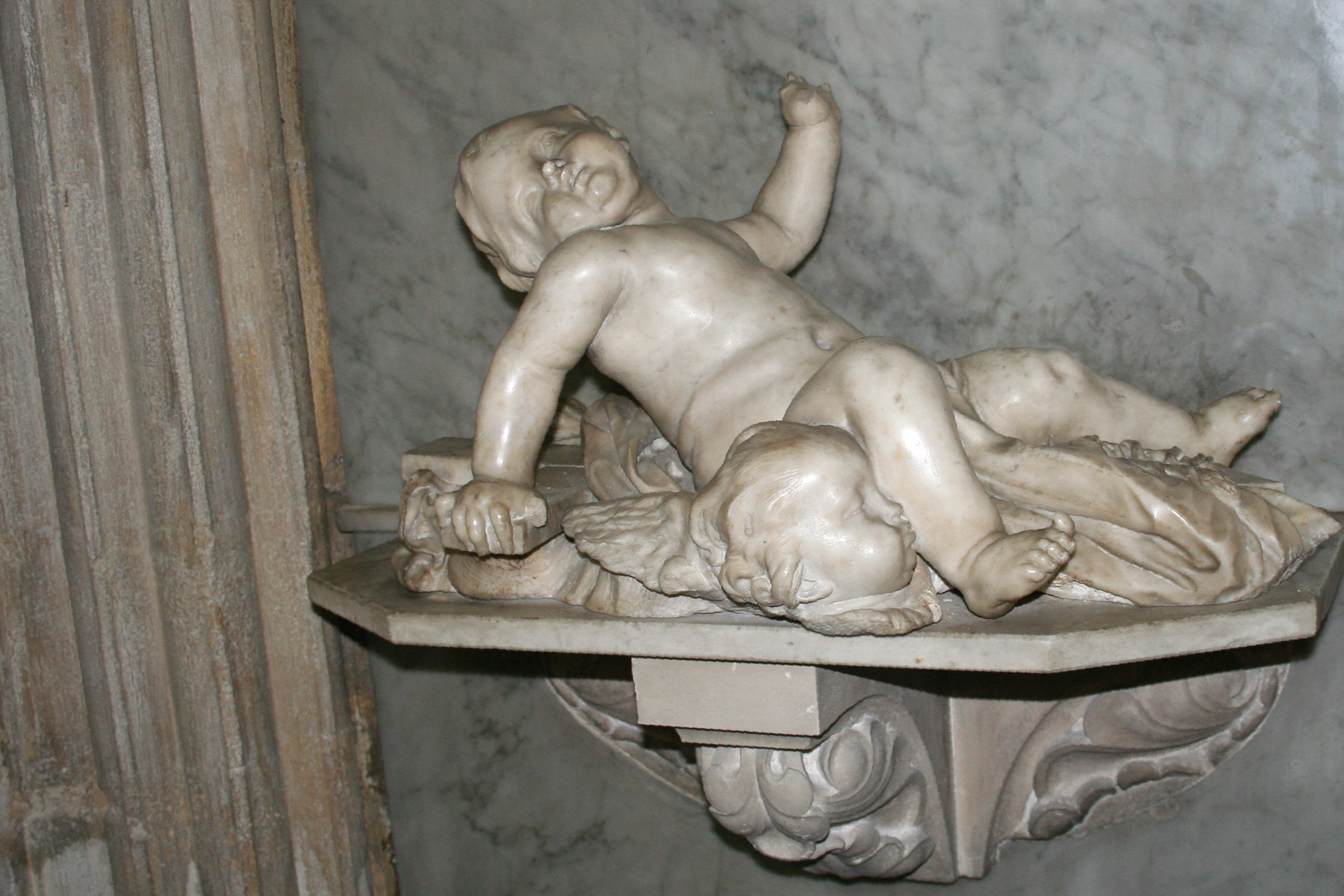 Sculpture en marbre de Chritophe Veyrier représentant l'enfant Jésus couché sur la croix ; cette sculpture se trouve dans la chapelle Saint-Louis évêque de l'église Saint-Jean de Malte à Aix-en-Provence